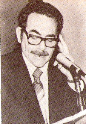 escritor argentino isidoro blastein